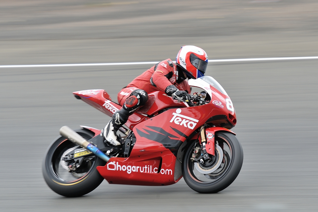 Ricard CARDUS pilotando la moto2 AJR del equipo Arguiñano Racing.